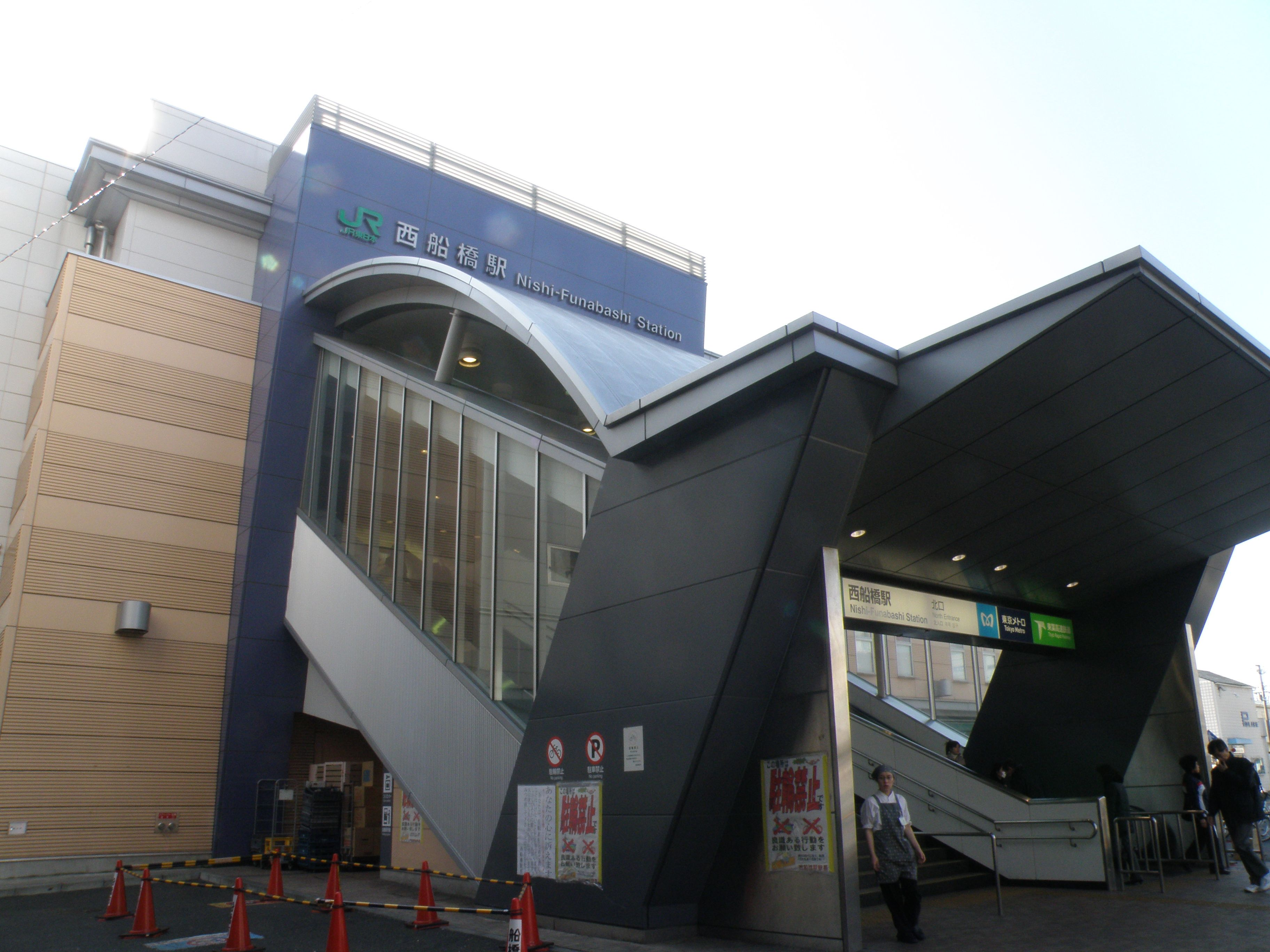 西船橋駅